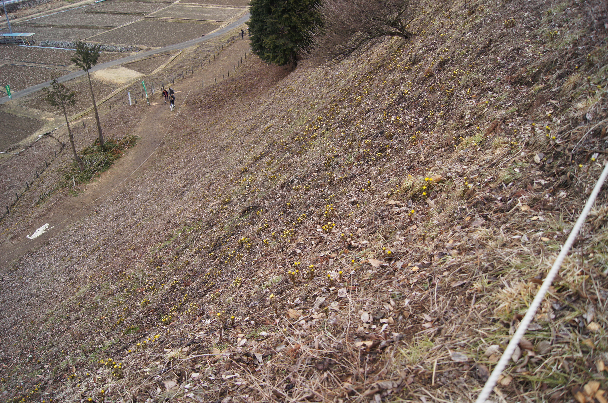 長野県松本市四賀の赤怒田福寿草公園の斜面。福寿草が咲いているが、この日は天候に恵まれず、花の鮮明度が低い。